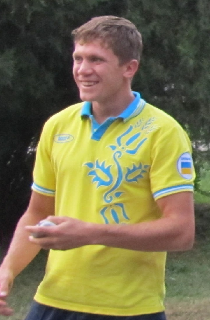 Шелестюк Тарас Олександрович (Кременчук, 4.10.2012)